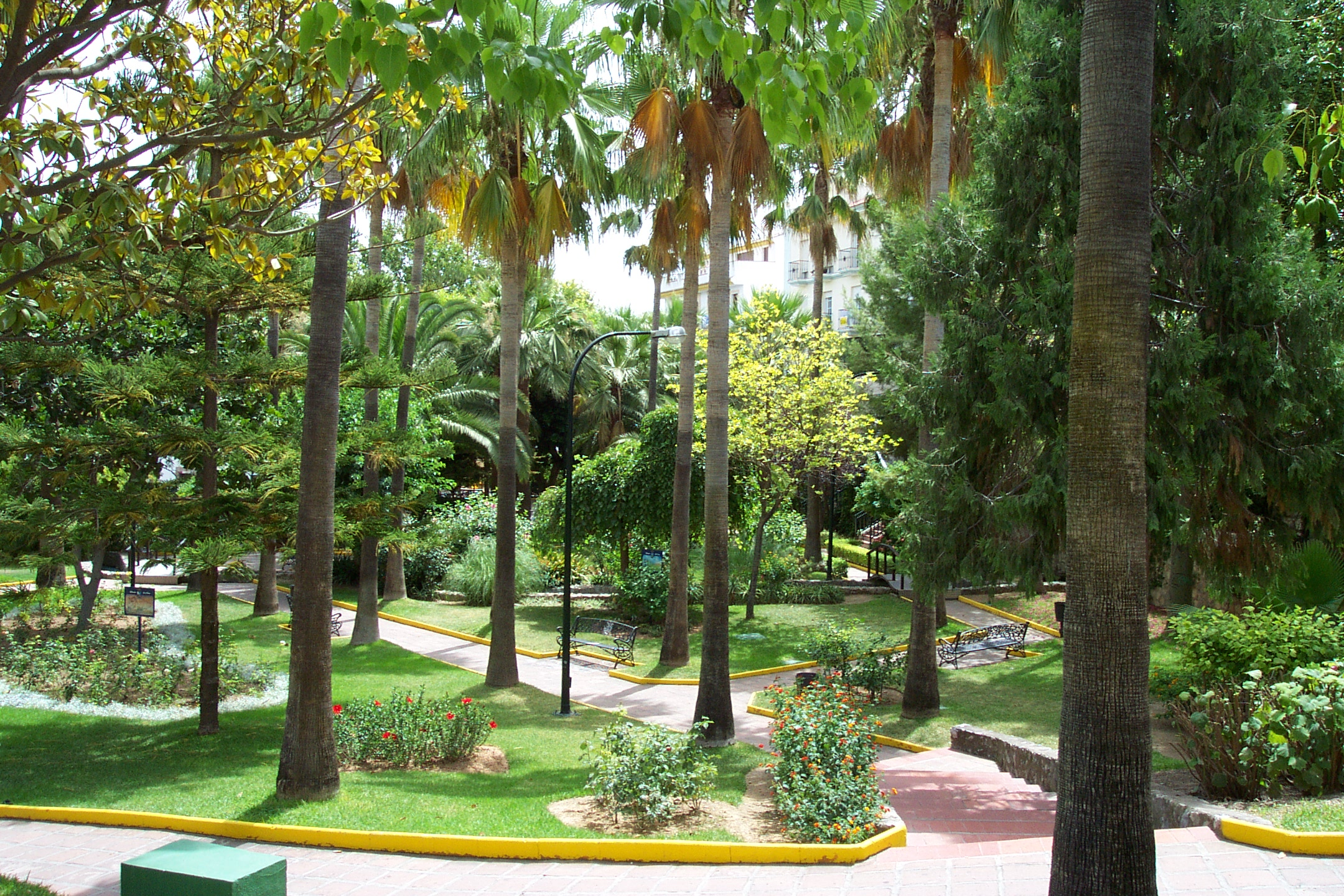 Alhaurín de la Torre, Spain.